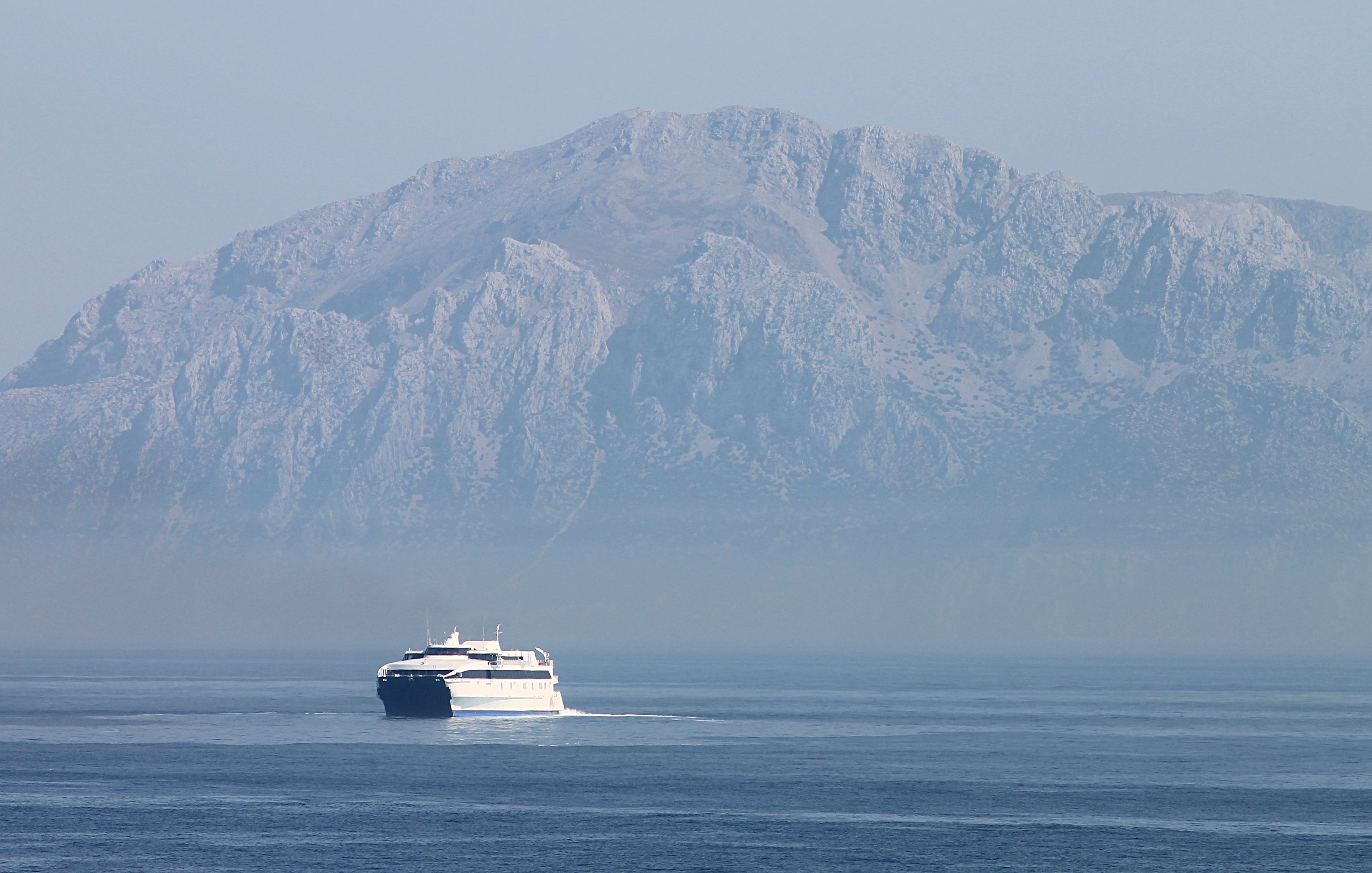 Le belvédère du détroit offre un panorama inoubliable sur les côtes africaines, à moins de 15 km.